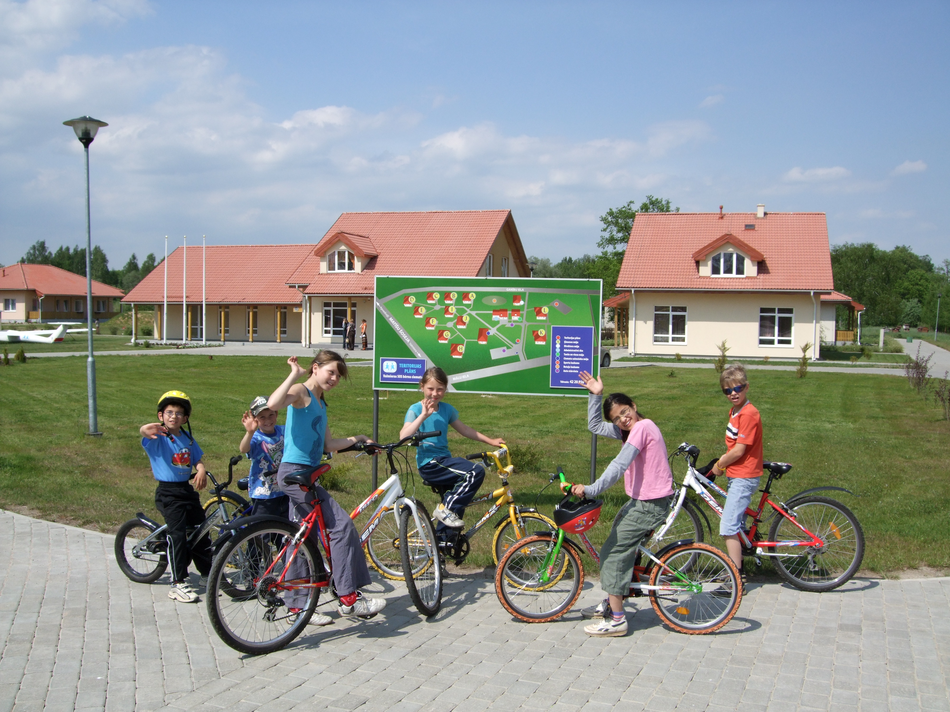 Valmieras SOS bērnu ciemats atrodas Valmierā, 107 km no Rīgas. SOS ģimenes ciematā dzīvo kopš 2007. gada. SOS ciemata bērni iegūst izglītību dažādās Valmieras novada un citās Latvijas izglītības iestādēs. Jaunākie ciemata bērni apmeklē pirmsskolas izglītības iestādes Valmierā. Ciemata bērni aktīvi piedalās ārpusskolas aktivitātēs, apmeklē mūzikas, mākslas vai sporta pulciņus.